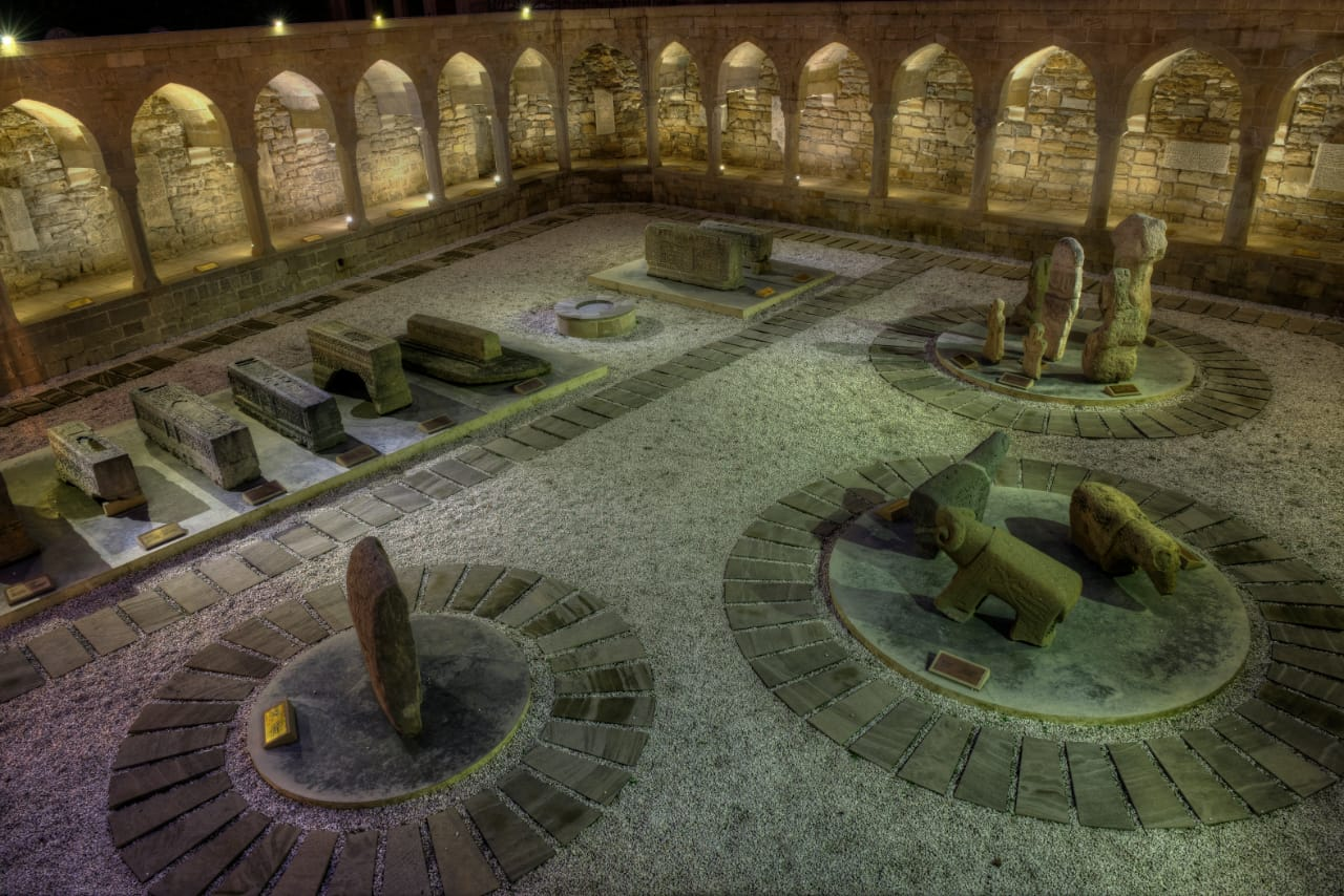 Sıratağlı dini-memarlıq kompleksi